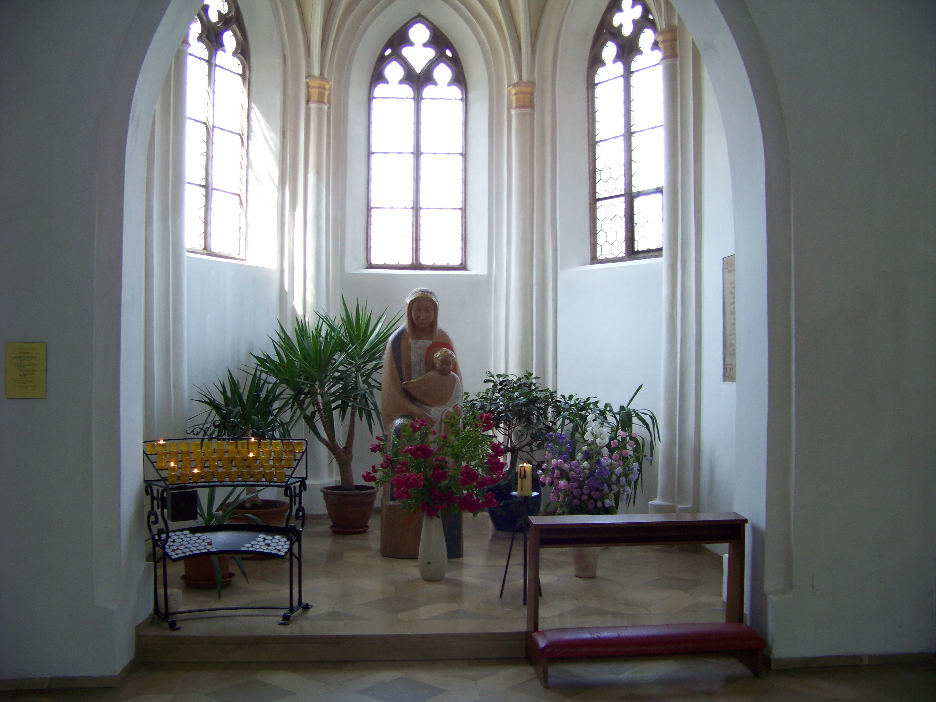 Geisenhausen, Martin-Zeiler-Straße 2. Katholische Pfarrkirche St. Martin. Altöttinger Kapelle an der Nordwand des Langhauses.